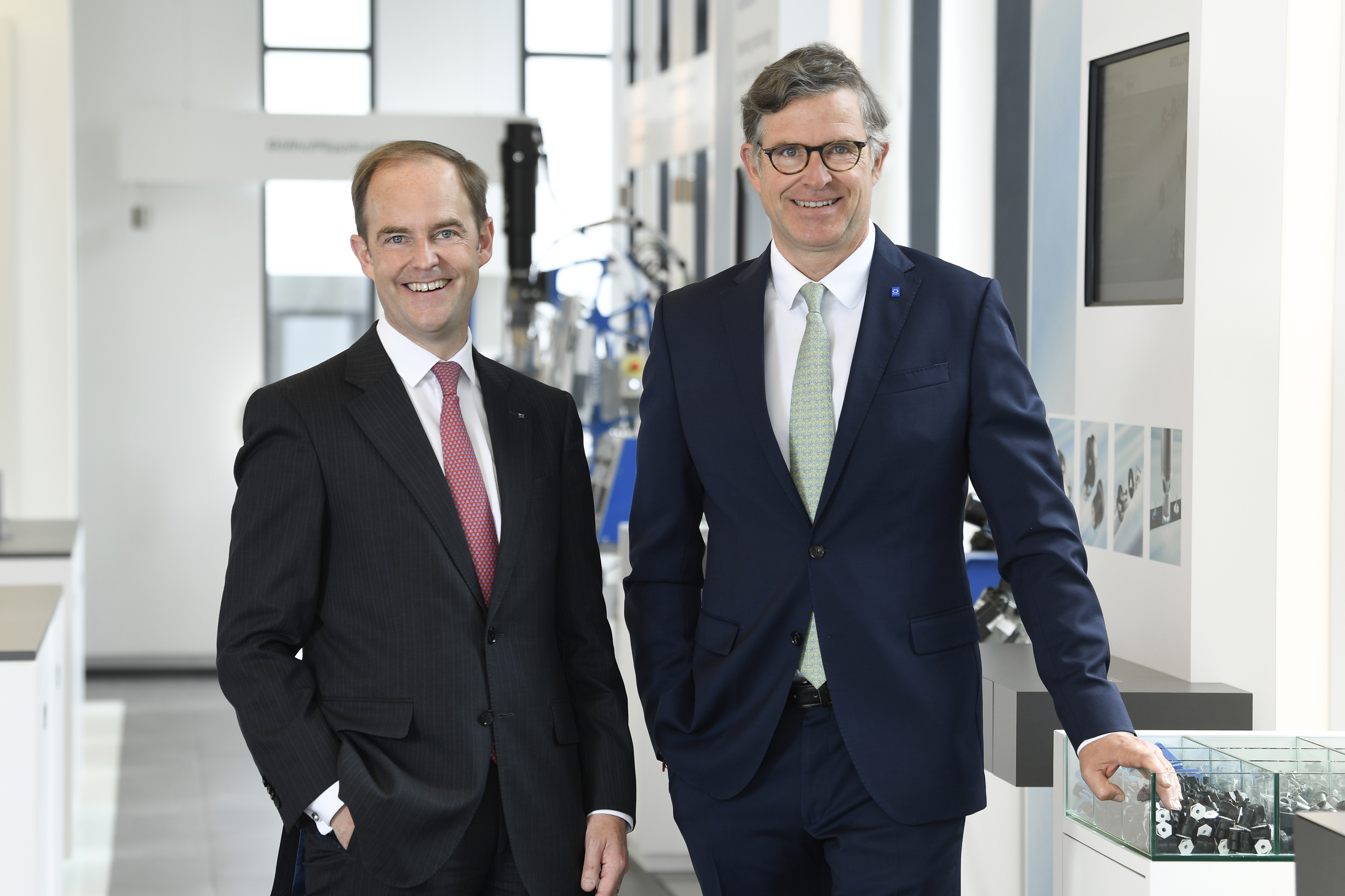 Wilhelm und Alexander Böllhoff in der Portrait Ansicht